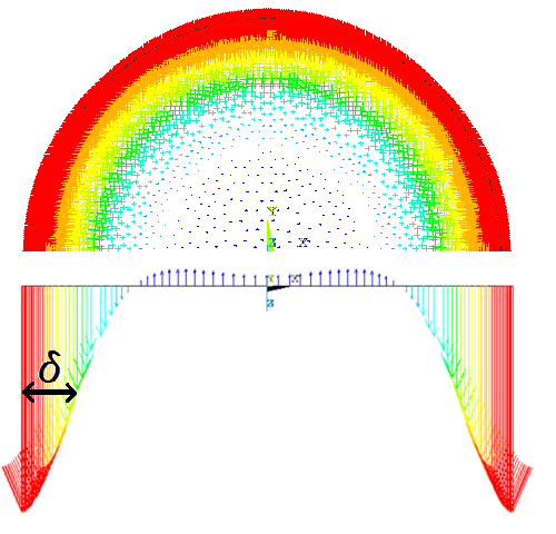 Rozkład gęstości prądu wzdłuż średnicy przewodu miedzianego okrągłego z widocznym prądem ujemnymUnknown